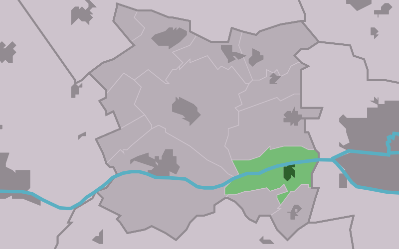 Kaartsje fan himrik fan Deinum